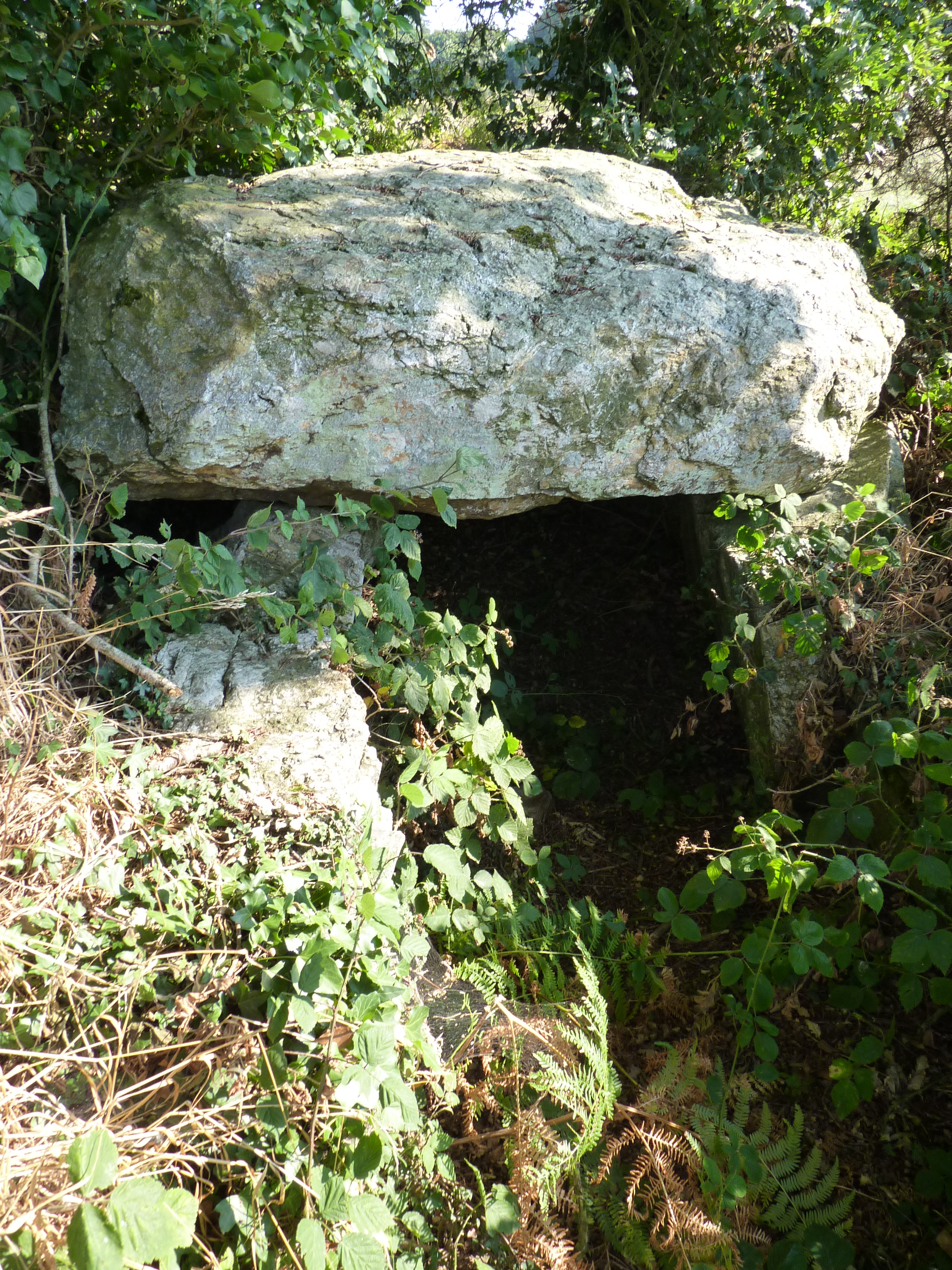 Allée couverte envahie par les fougères. Autres noms : "La Gentière" ou "La Bernais".